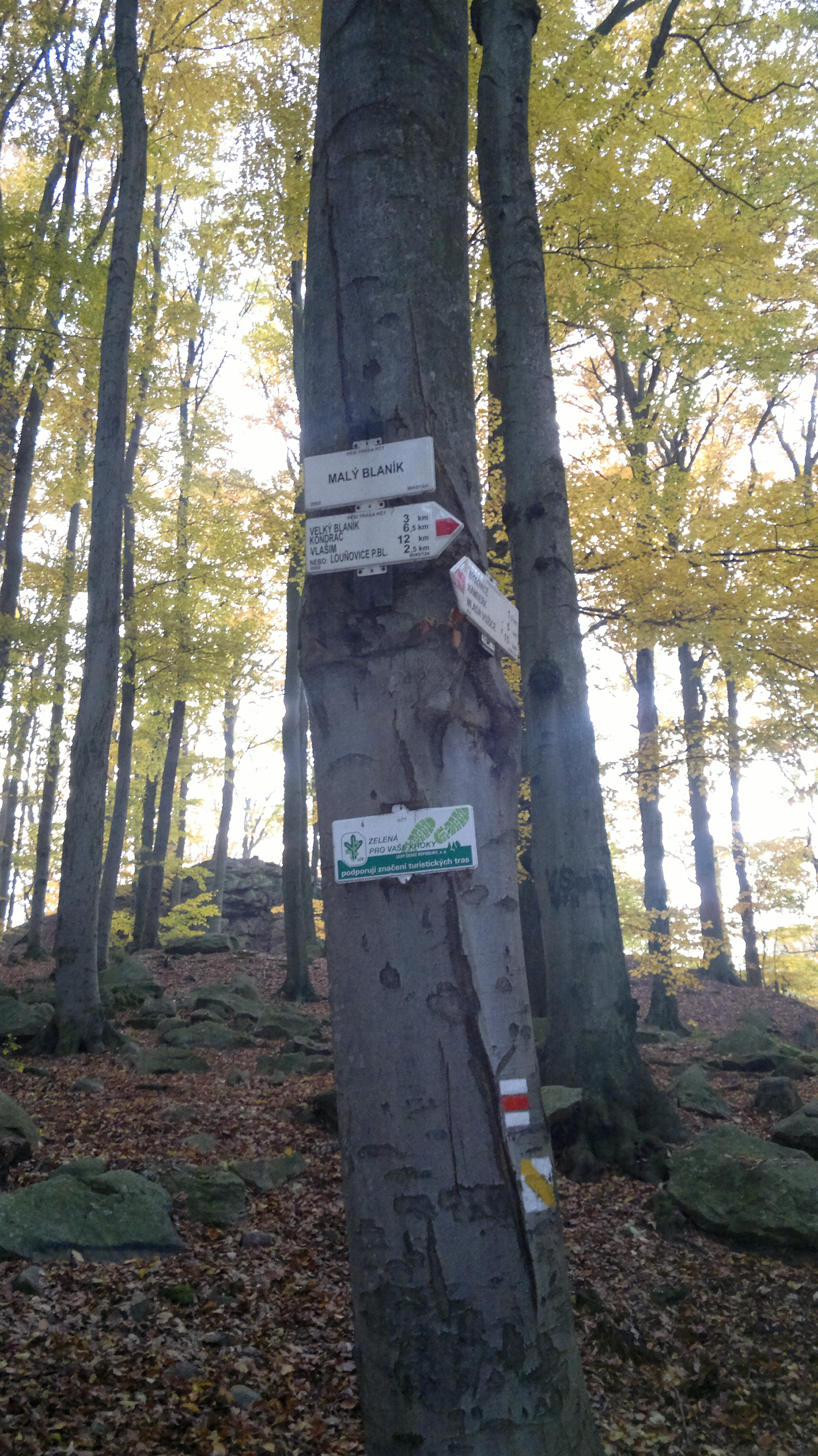 Rozcestník na Malém Blaníku